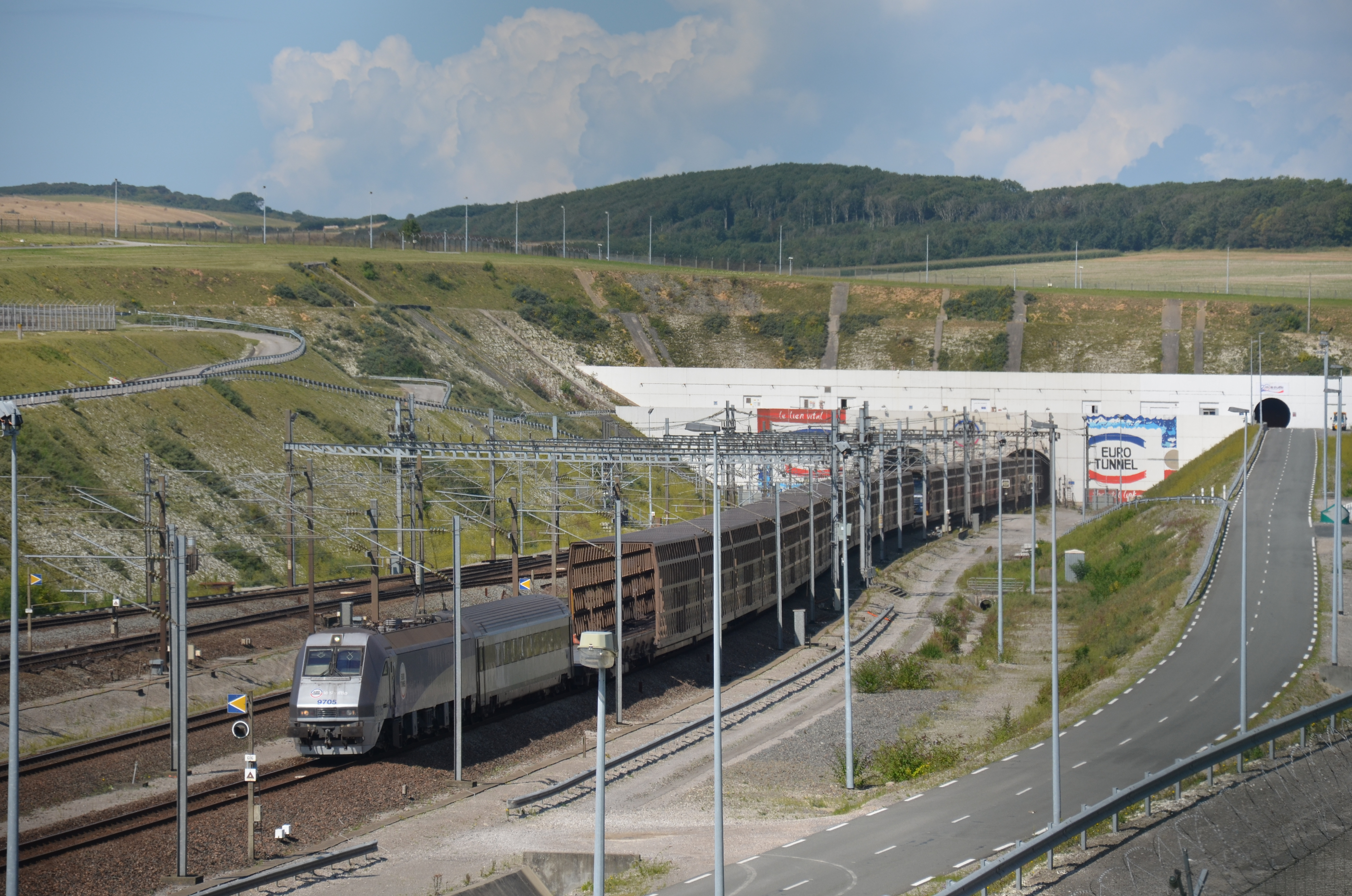 Eurotunnel Shuttle assurée en Class 9705 à la sortie du tunnel sous la Manche à Coquelles (France).